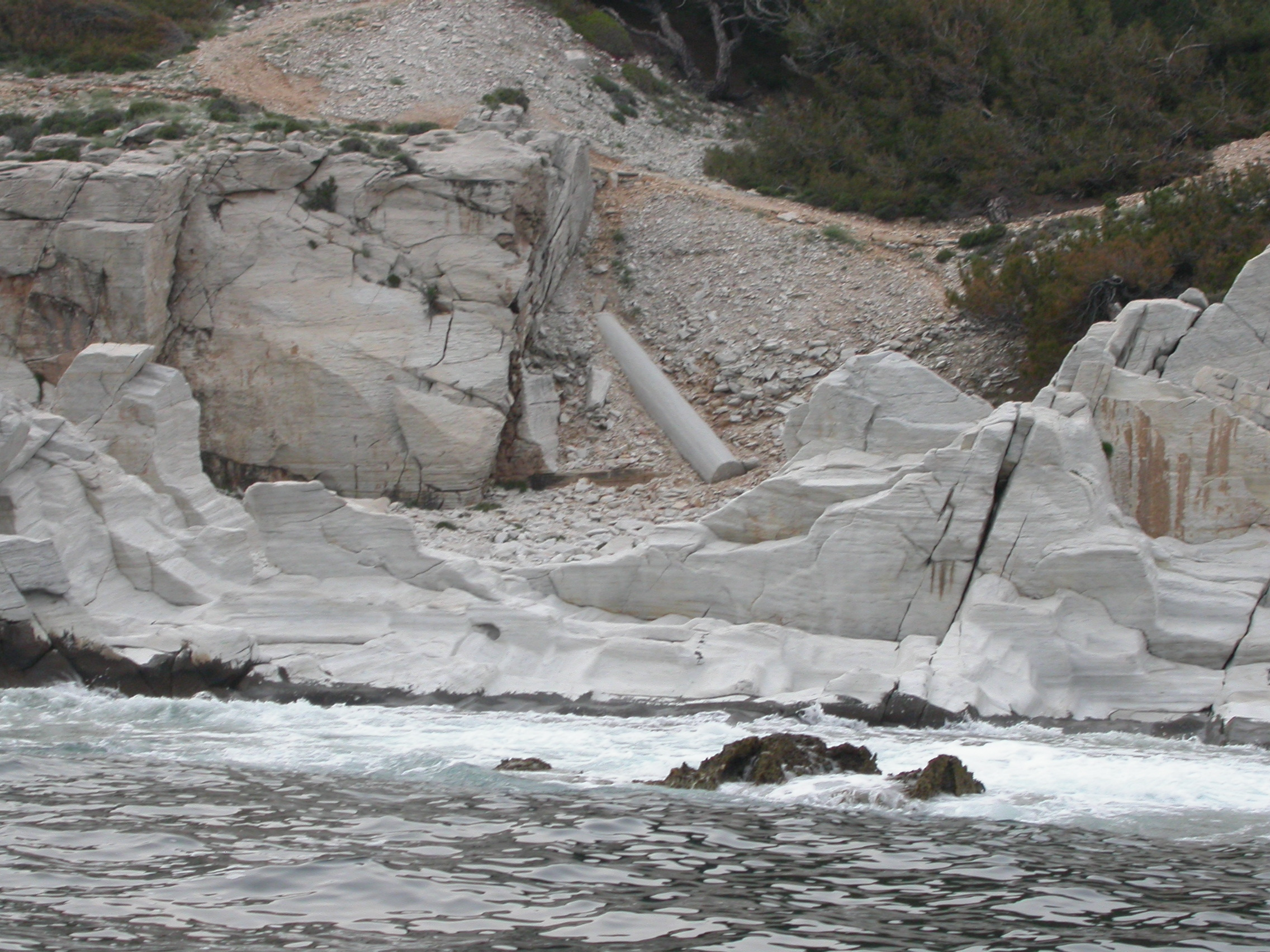 Ancient marble quarries of Aliki.